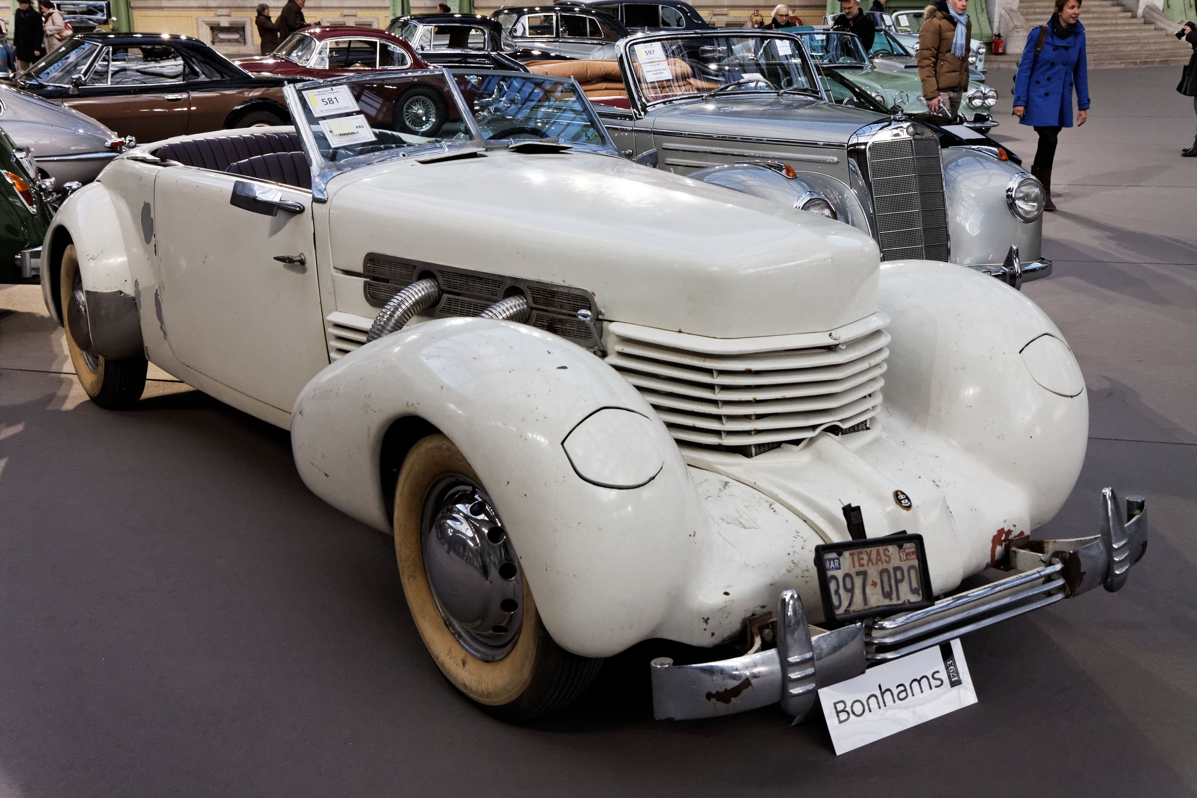 Une Cord 812 compresseur phaetom de 1937.